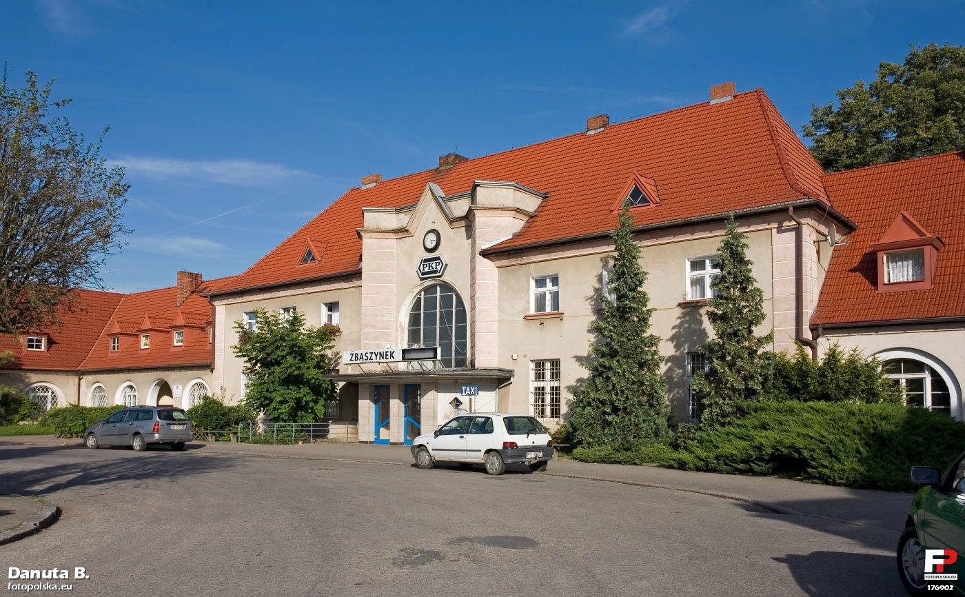 Środkowa część budynku dworca. Zaskakująco małe jest wnętrze przeznaczone dla podróżnych. Ale węzeł Zbąszyń, jako stacja graniczna wymagała sporej admininstracji, dodatkowo w jednym skrzydle siedzibę miała poczta.